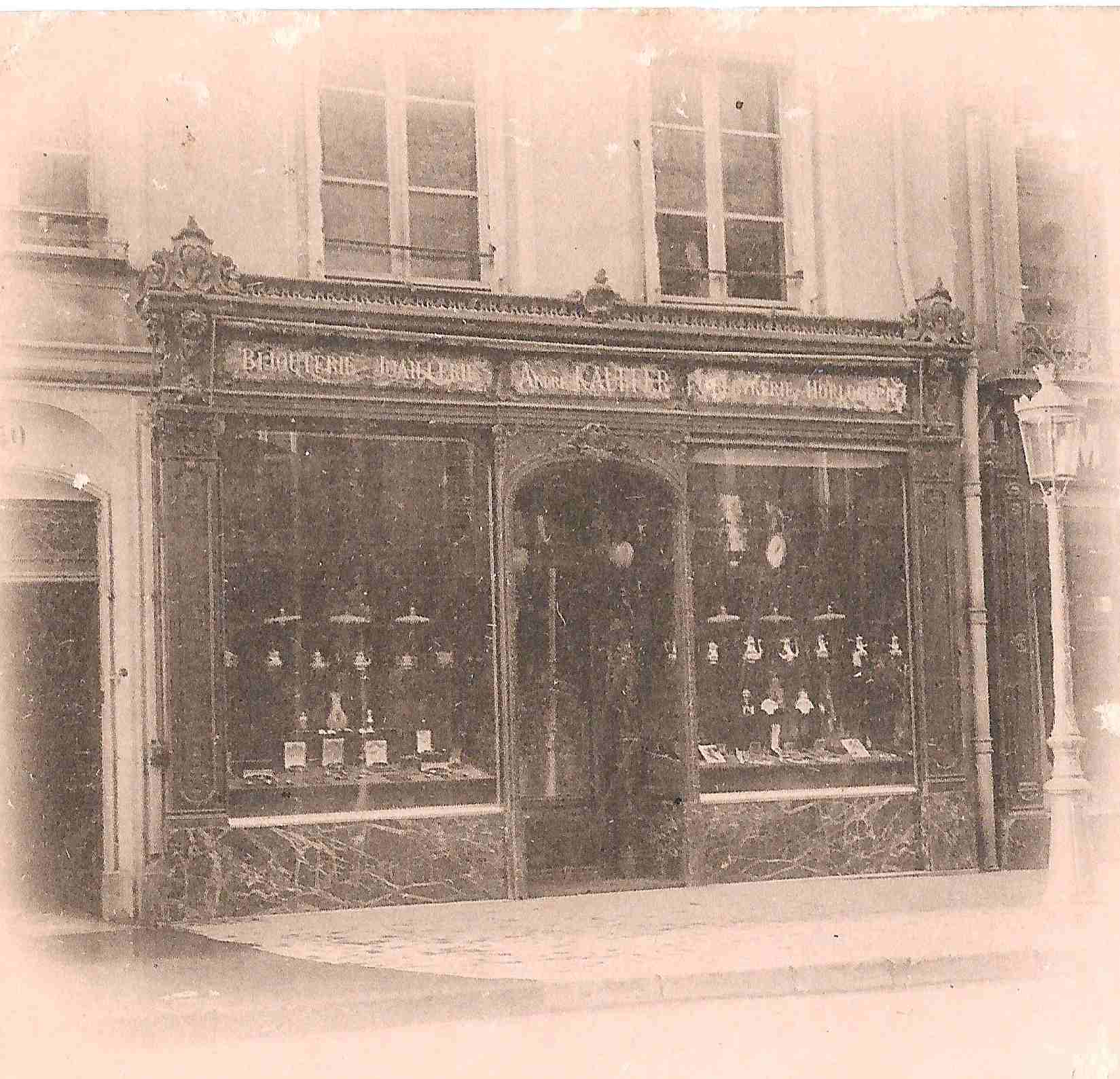 D'après une carte postale de 1901